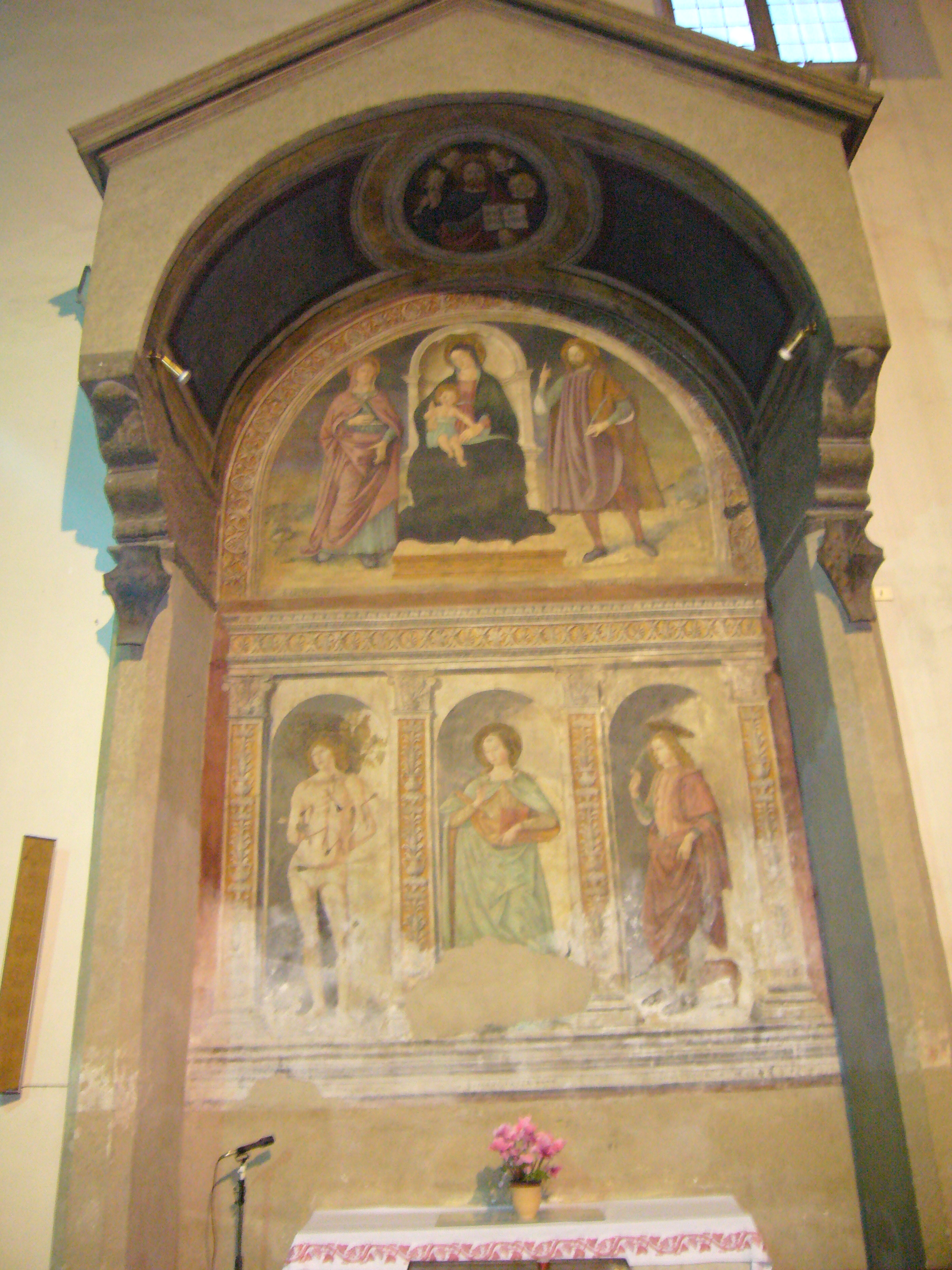 altare dei santi